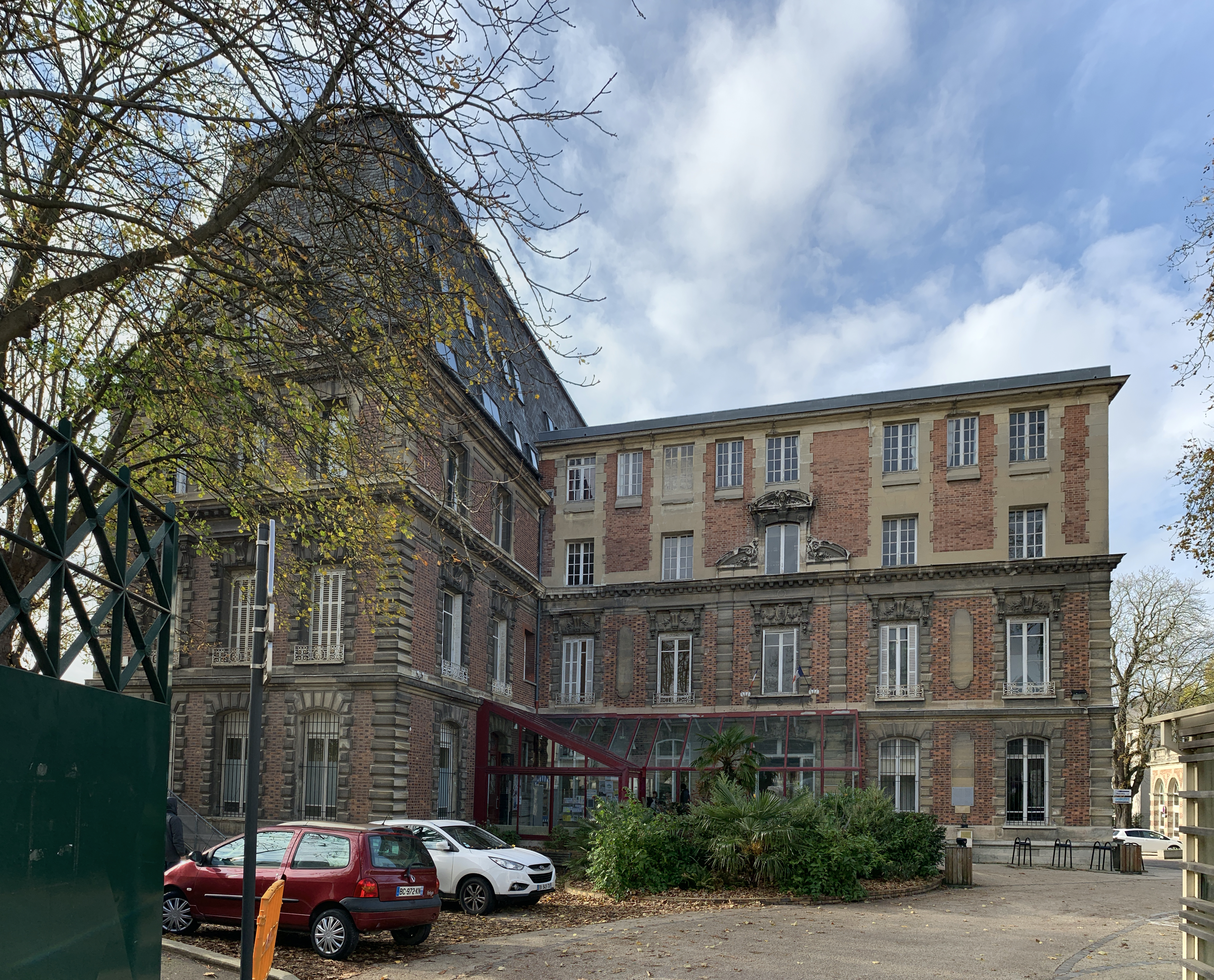 Maison du Citoyen et de la Vie Associative, Fontenay-sous-Bois.